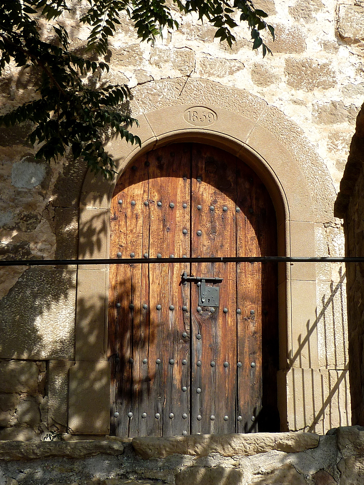 Capella de Sant Joan de Puig-redon (Torà): porta d'accès